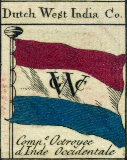 Vlag van de Geoctroijeerde West-Indische Compagnie, volgens Bowles's naval flags of the world, 1783